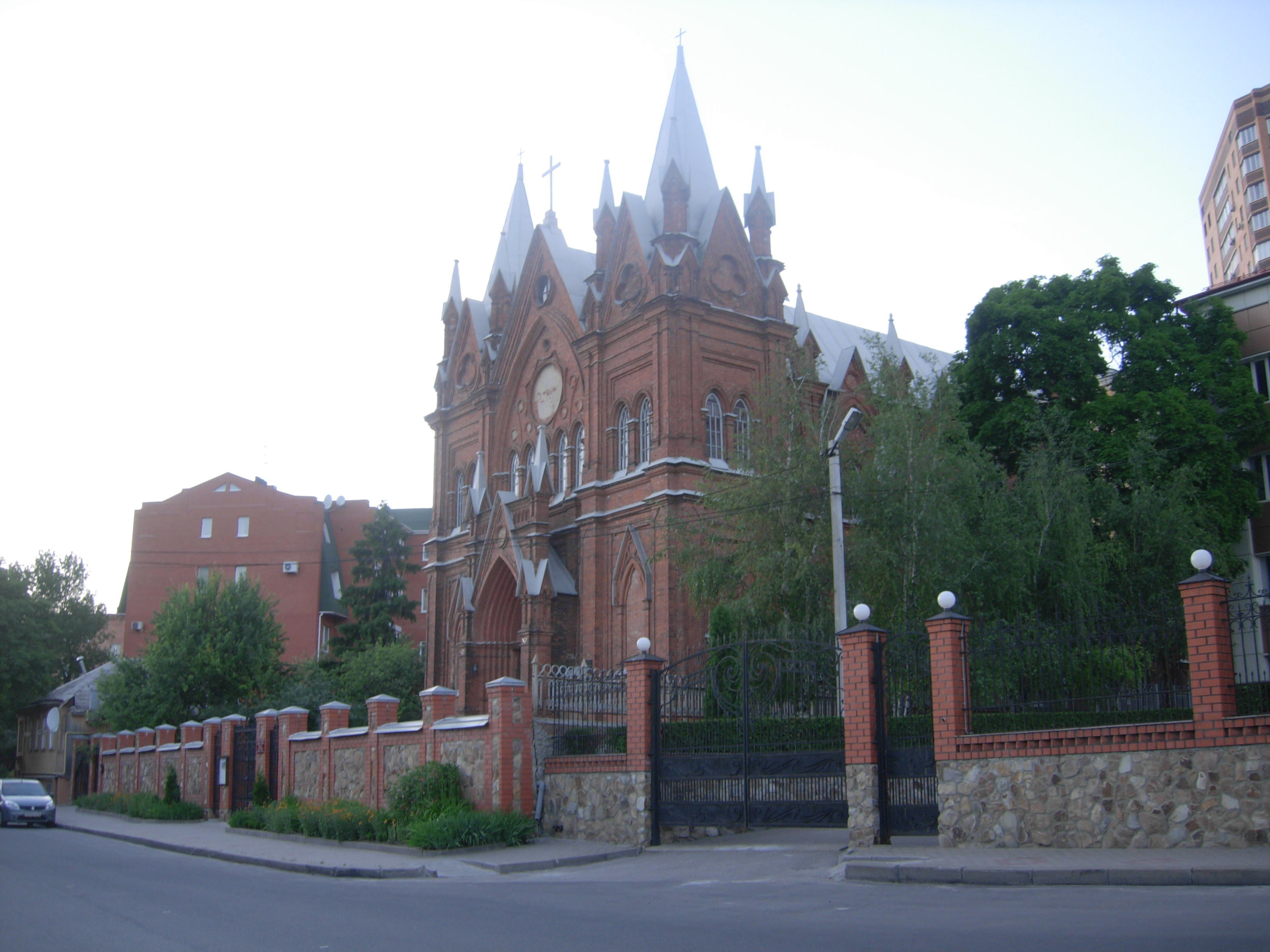 Польский костел (Курская область, Курск, марата улица, 31)